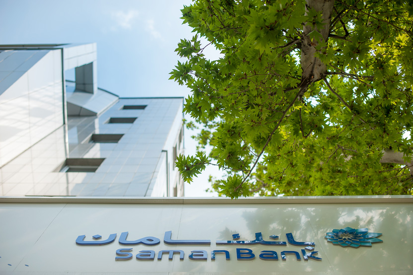 تصویر سر‌در بانک سامان شعبه جام جم تهران